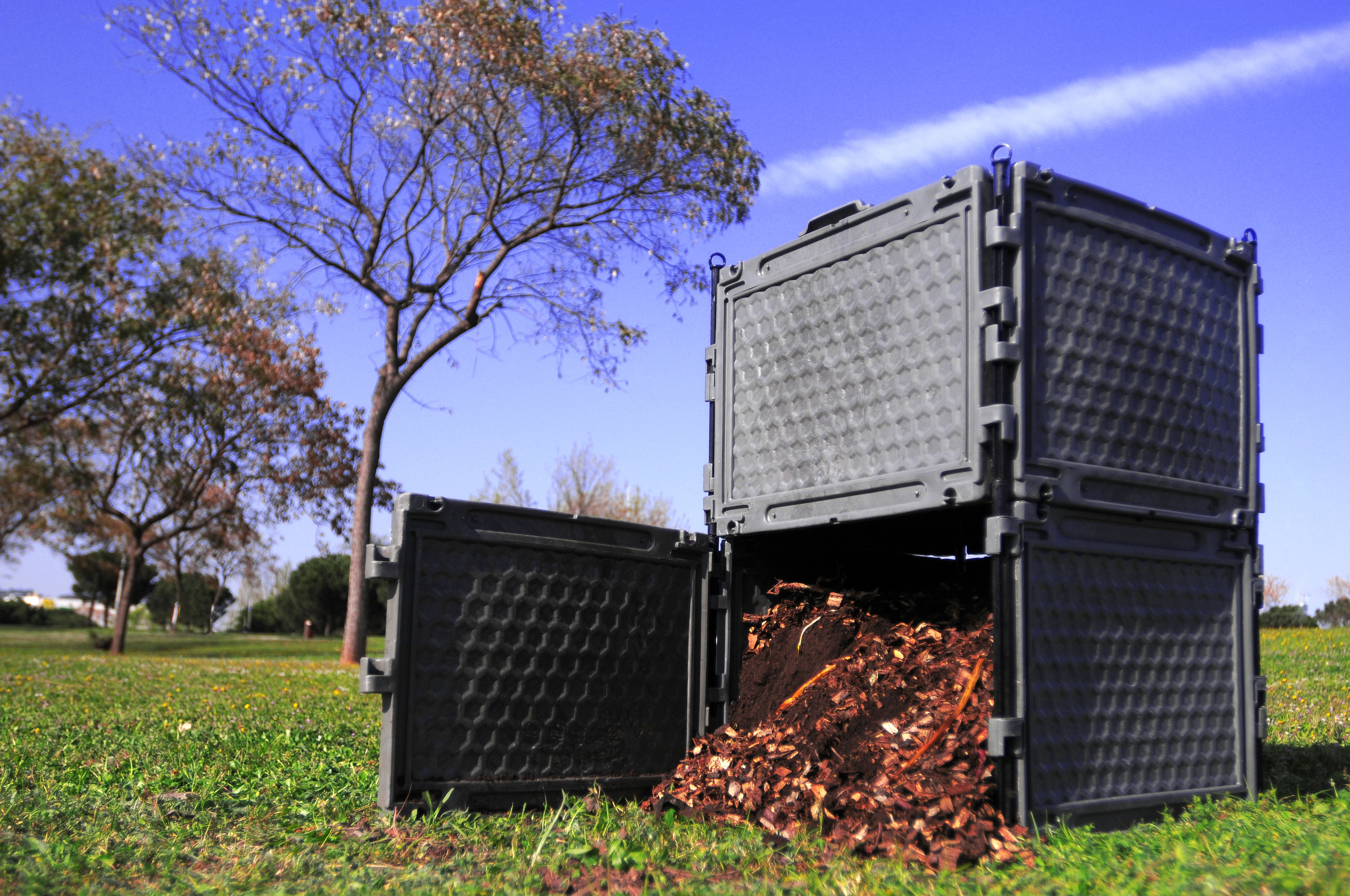 Compostador modular, compartimentable y ampliable